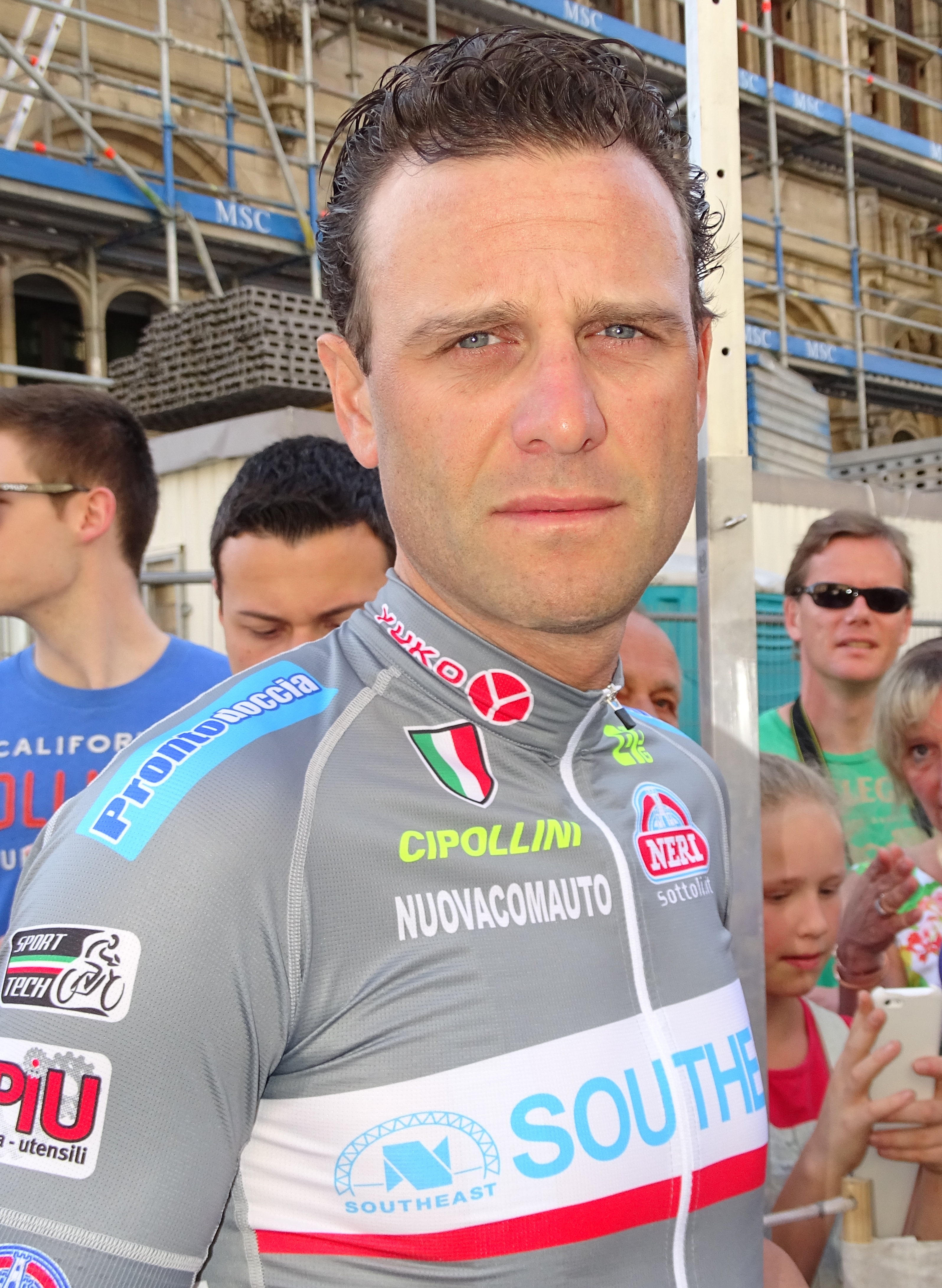 Reportage réalisé le mercredi 15 avril à l'occasion du départ de la Flèche brabançonne 2015 à Louvain, Belgique.